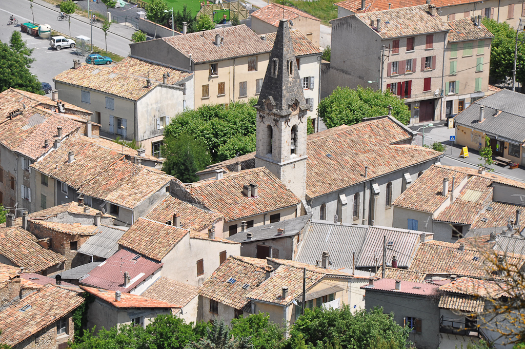 Barrême, église et village